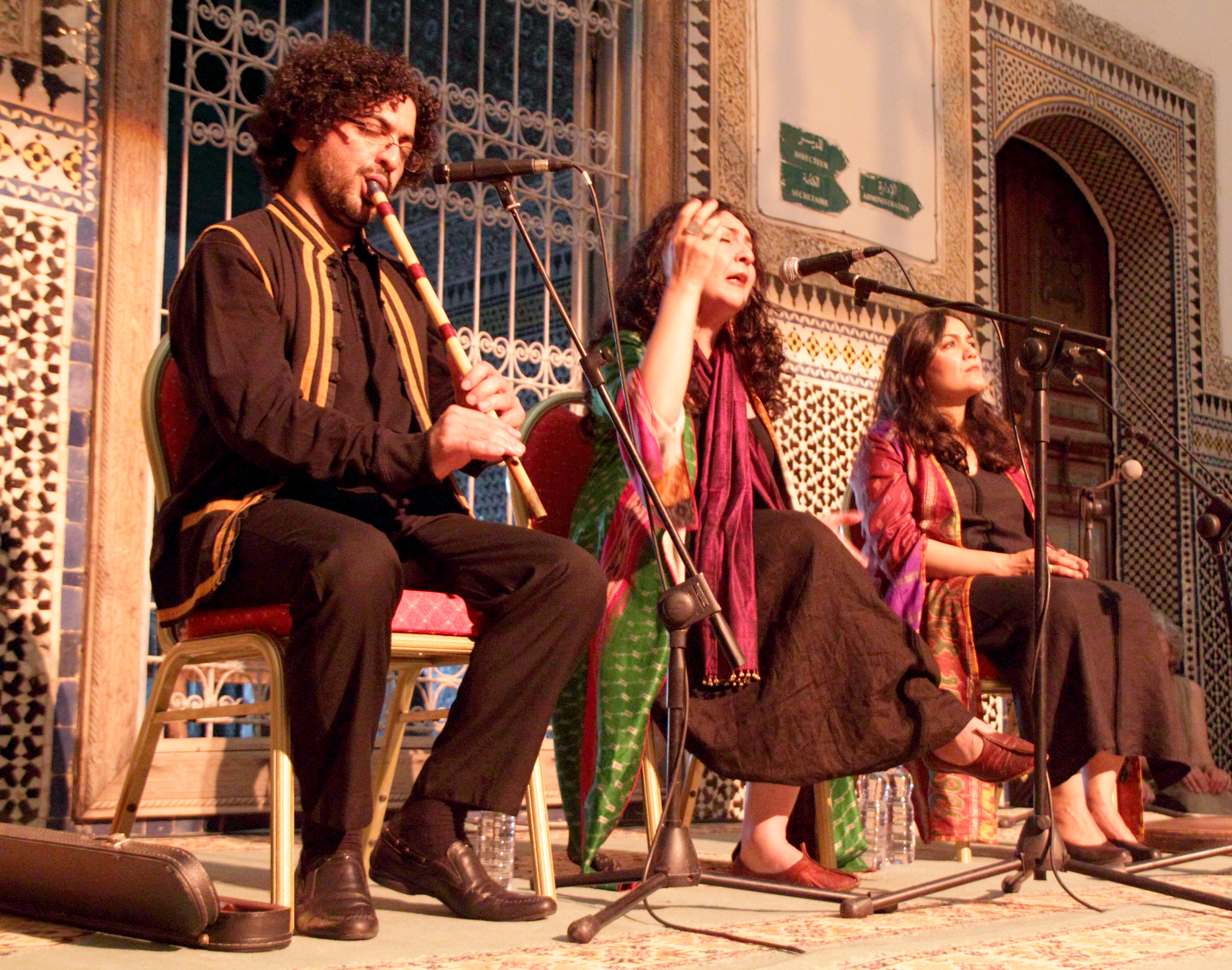 Mahsa and Marjan Vahdat, Iran